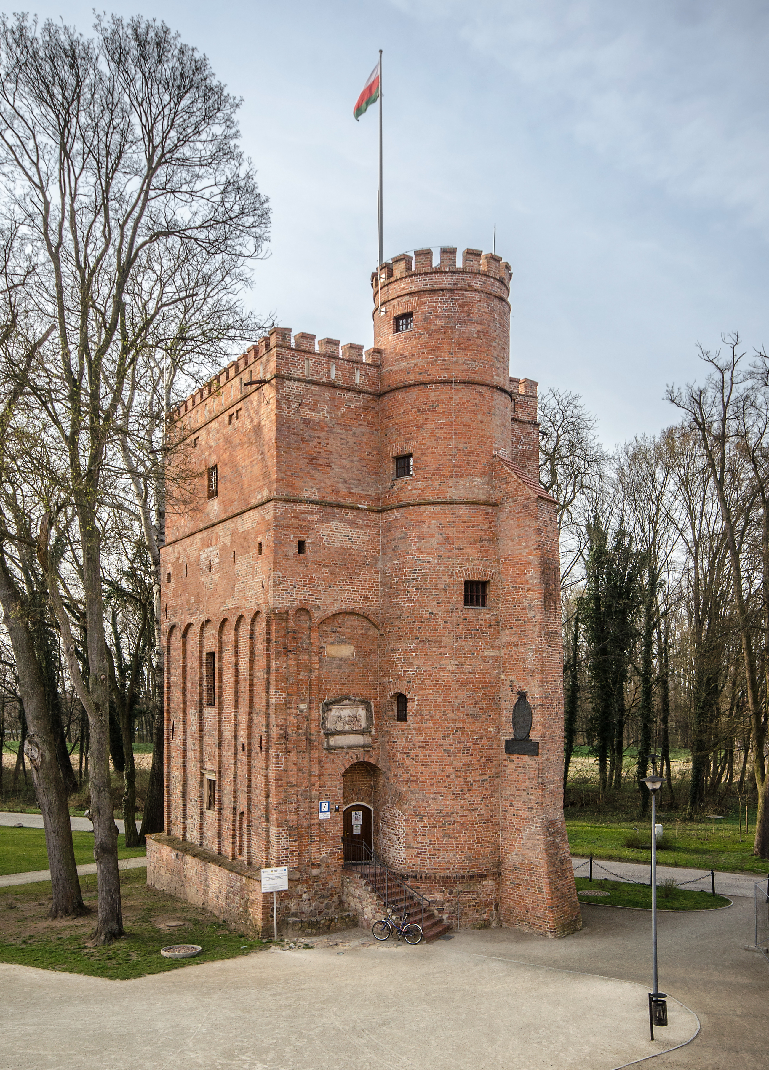 Żmigród, baszta (pozostałość zamku), XIV